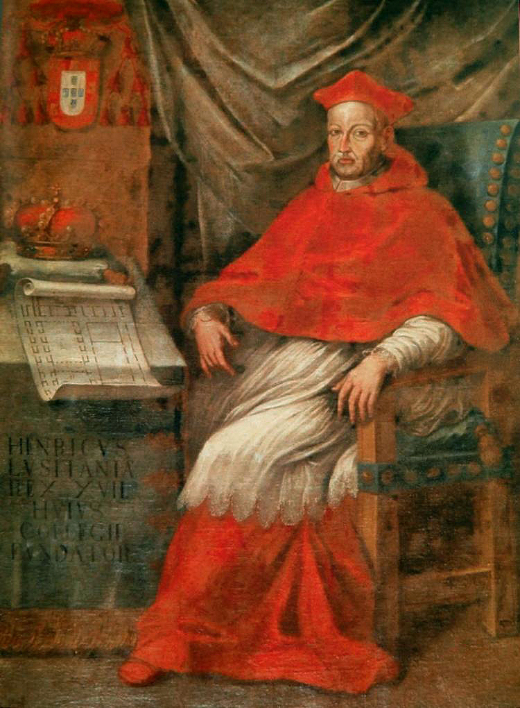 Cardeal D. Henrique.(31 Jan. 1512; 31 Jan. 1580)